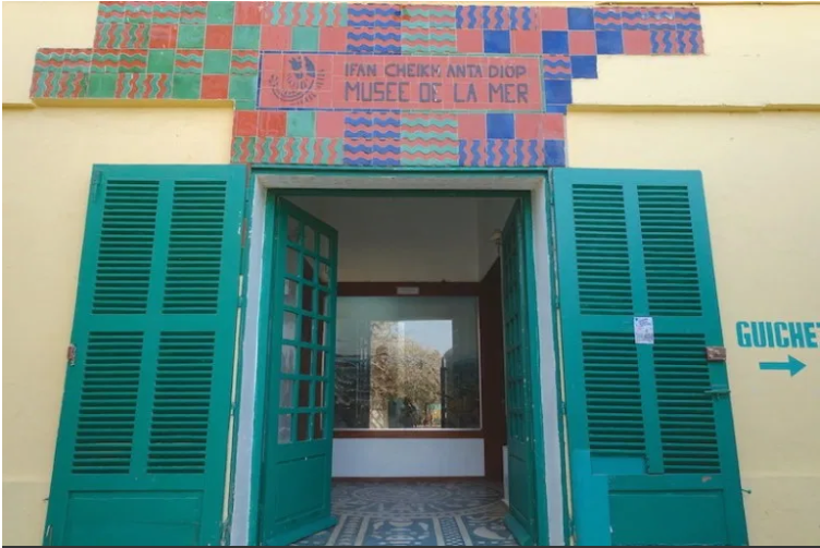 Entrée du musée de la mer, vue de face